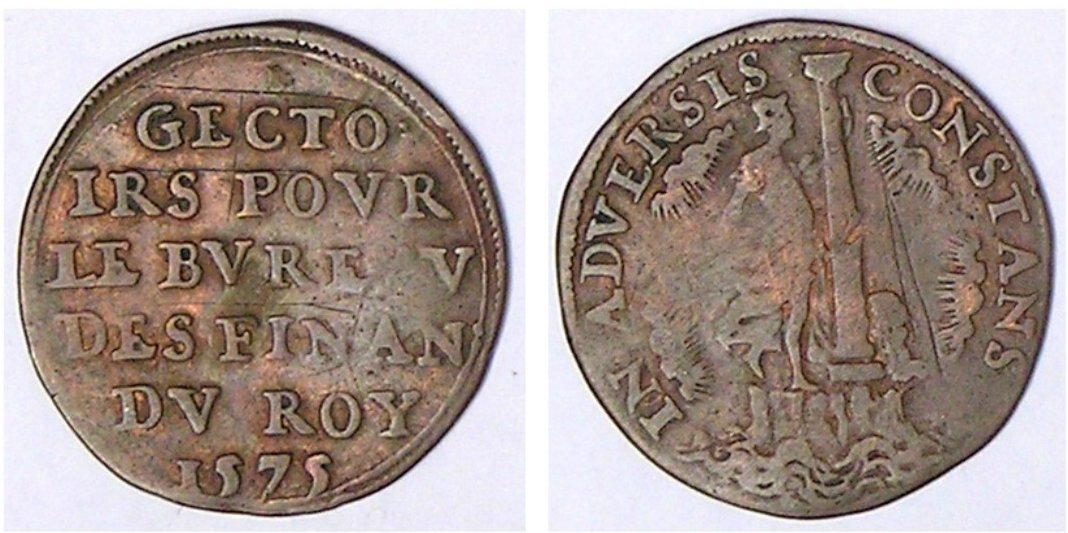 Afbeelding van een rekenpenning uit 1575. Foto van eigen exemplaar.